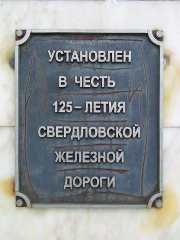 Табличка на обелиске Европа-Азия, о.п. Хребет-Уральский, Свердловская ж.д.